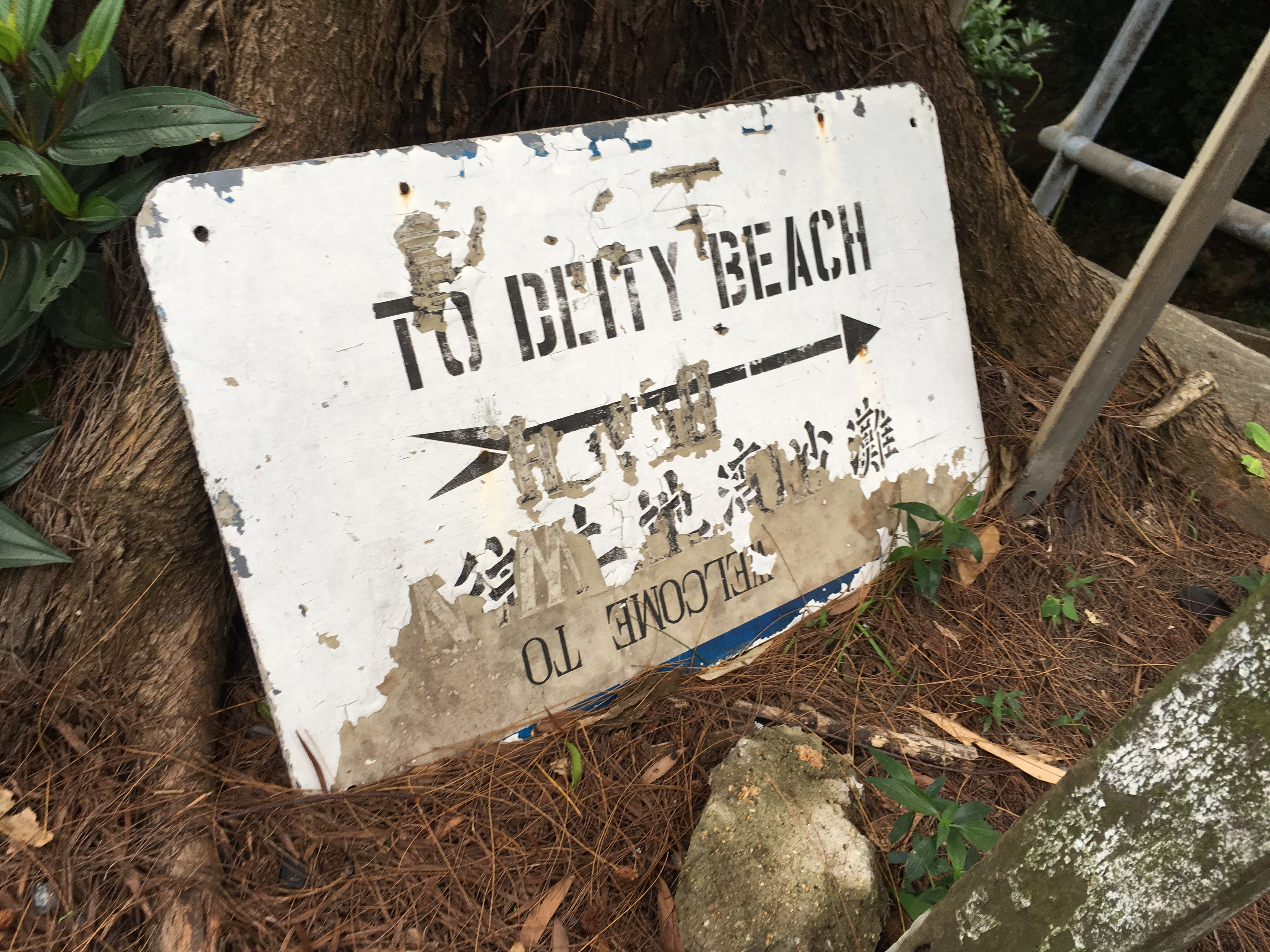 土地灣村己棄置的舊路牌